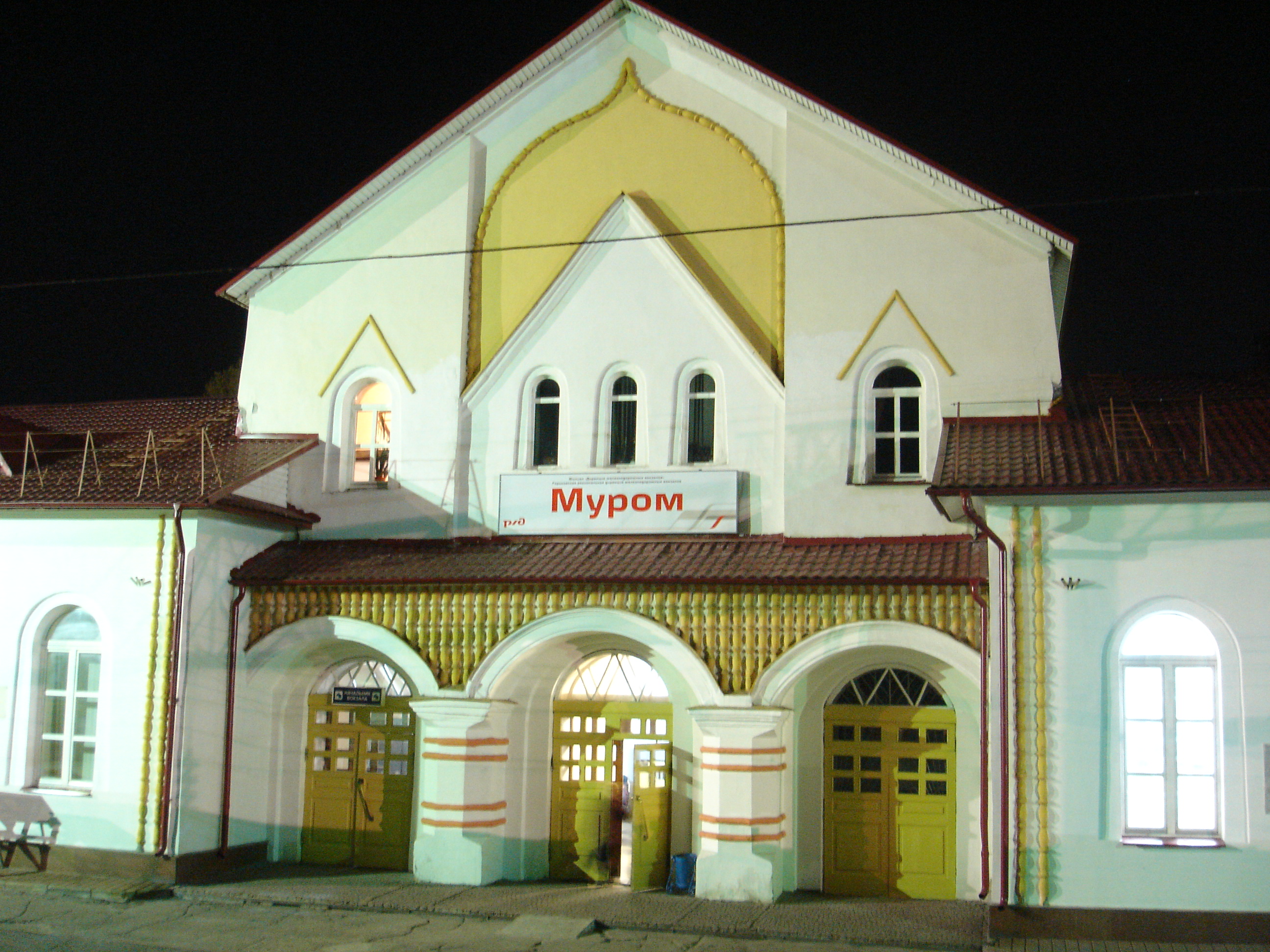 Здание муромского железнодорожного вокзала. Было построено в 1912 году по проекту архитектора Алексея Викторовича Щусева.